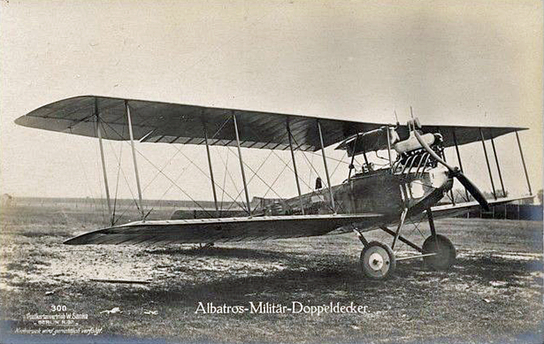 Albatros-Militär-Doppeldecker, Tragflächen mit drei Stielpaaren, Sanke Postkarte 300